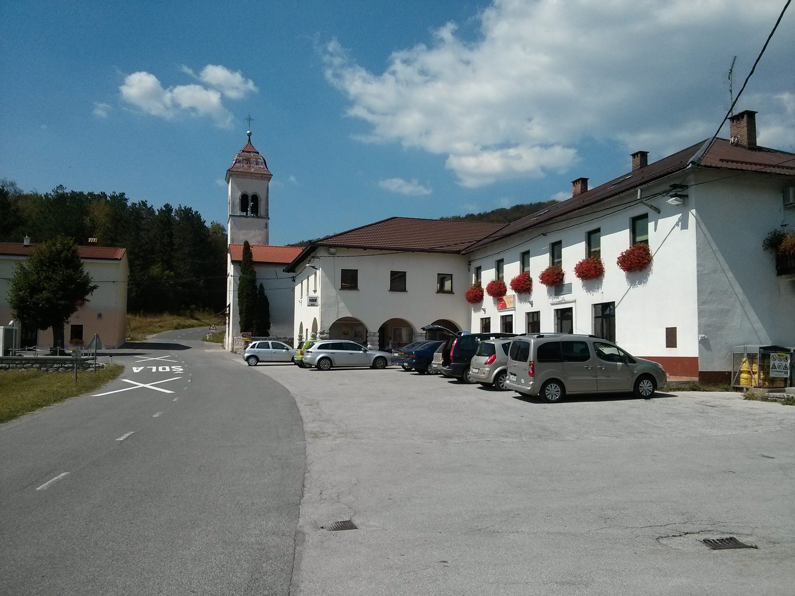 Otlica